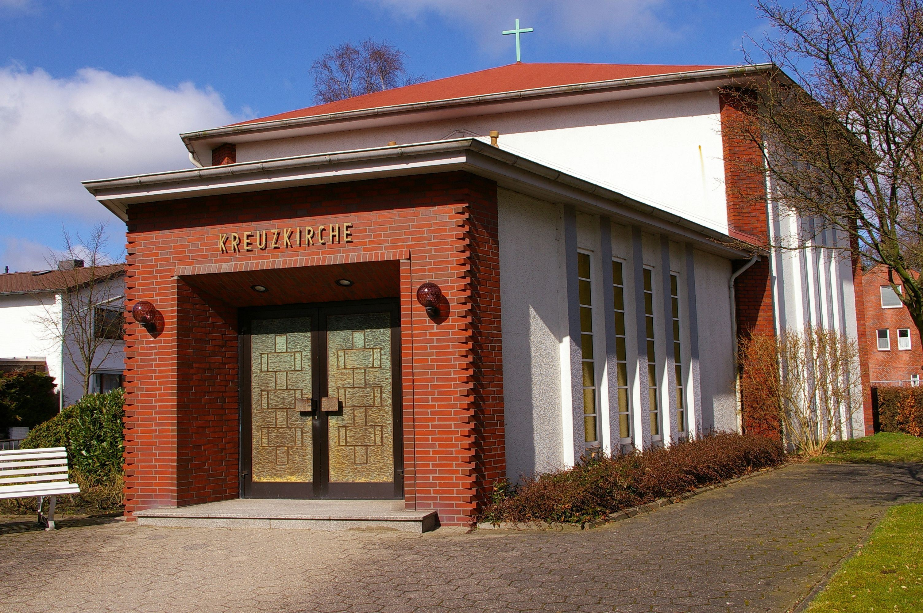 Freikirche Baptisten Schulstraße Wilhelmshaven